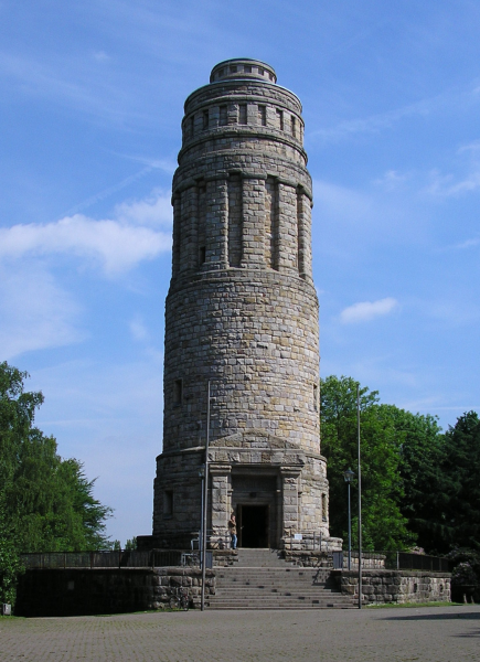 Der Bismarckturm in Bochum, Juni 2005, selbst fotografiert